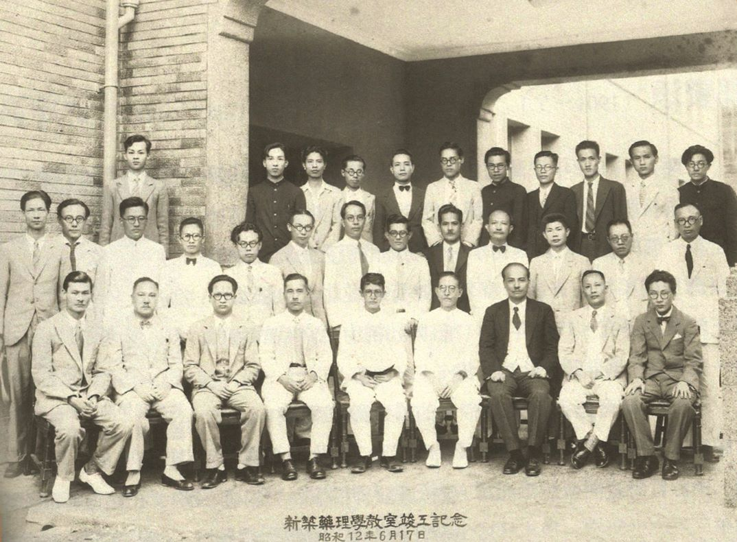 臺北帝國大學藥理學教室竣工記念。